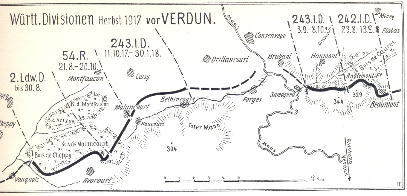 Karte: Württ. Divisionen Herbst 1917 vor Verdun